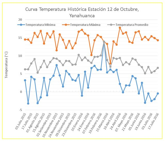 Curva Temperatura Yanahuanca 2015-2016 según Estación Meteorológica 12 de Octubre, Yanahuanca